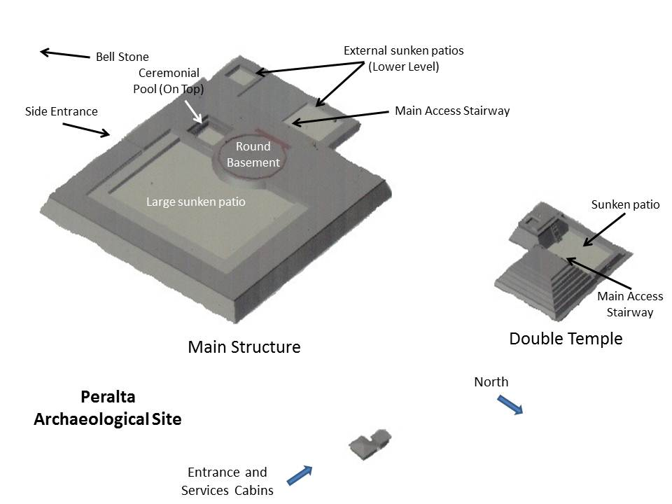 Site layout